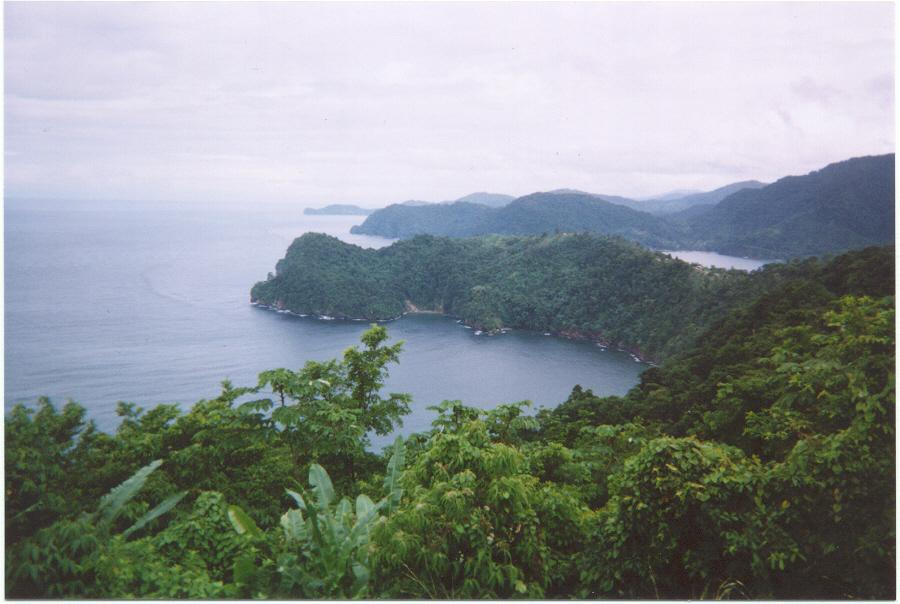 Lookout_point.JPG